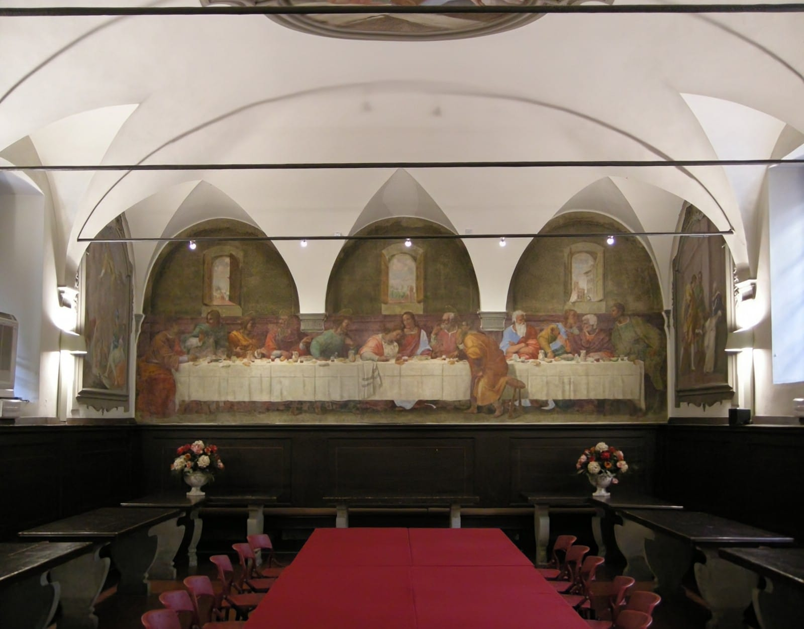 Monastero della calza, refettorio